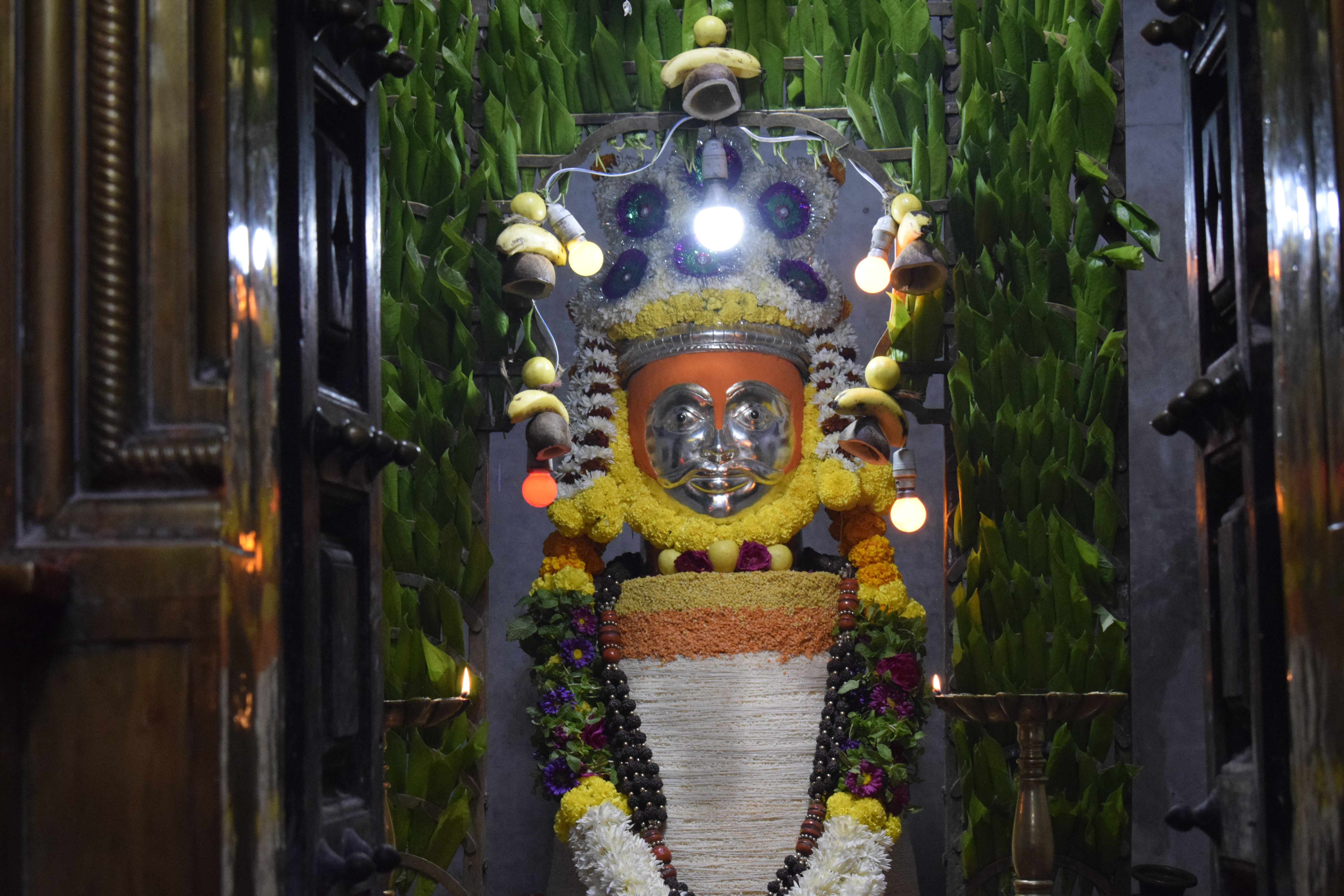 श्री मल्लिकार्जुन लिंग